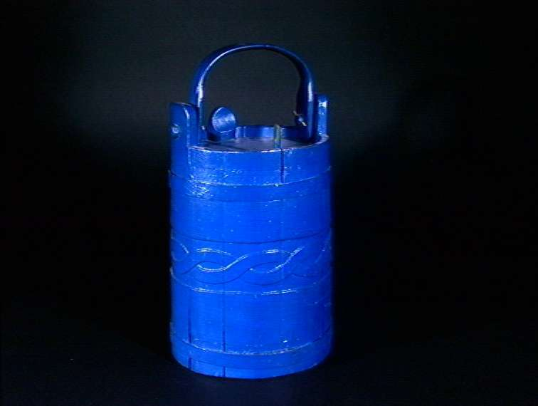 Spunsbøtte datert 1787 fra Hallingdal med skåret dekor og sekundær maling. Diameter 31. cm. Foto: Anne-Lise Reinsfelt /Norsk Folkemuseum NF.1925-0846.